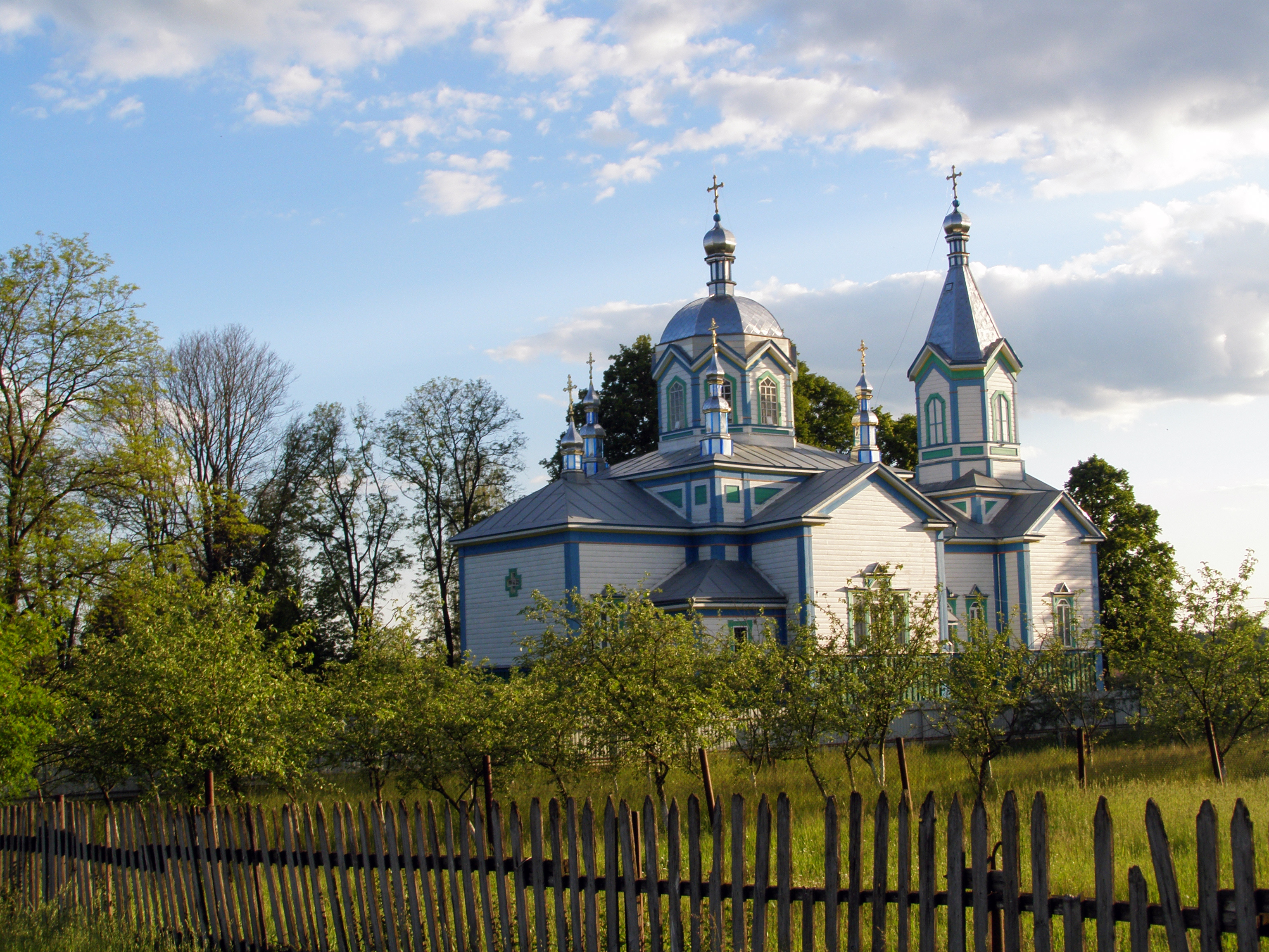 Церква Св. Великомученика Дмитра, с. Щорсівка